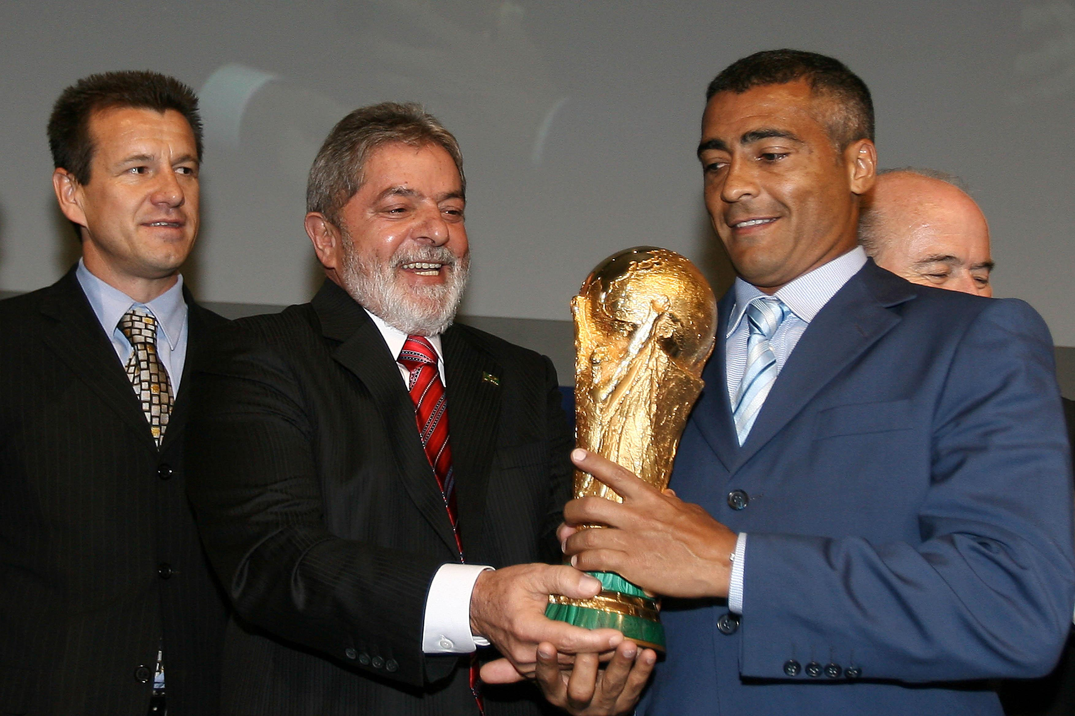 Zurique (Suíça) - Presidente Lula, Dunga e Romário após anúncio da Fifa de que o Brasil sediará a Copa do Mundo de 2014.